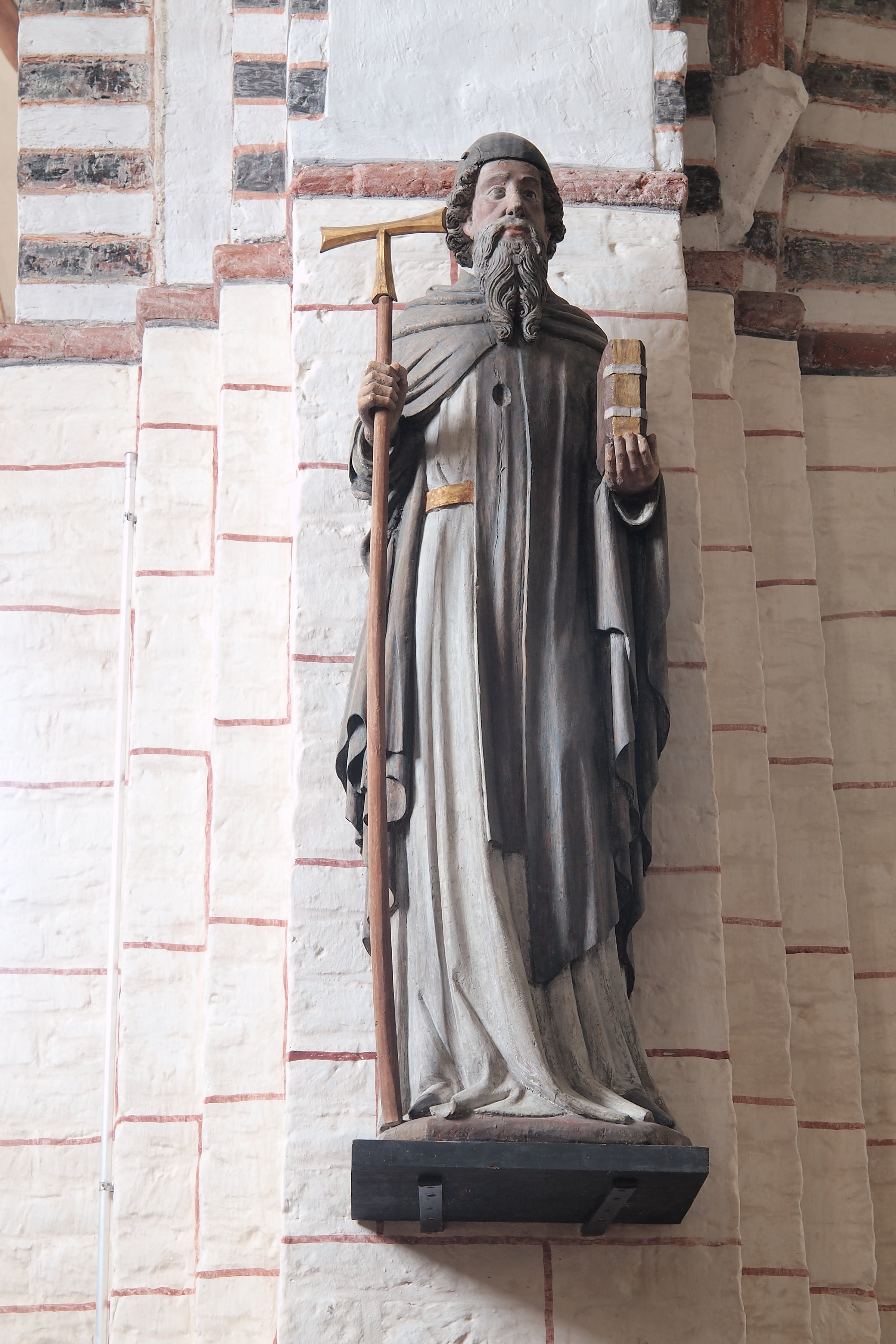 Statue des heiligen Antonius in St. Nikolai in Burg auf der Insel Fehmarn